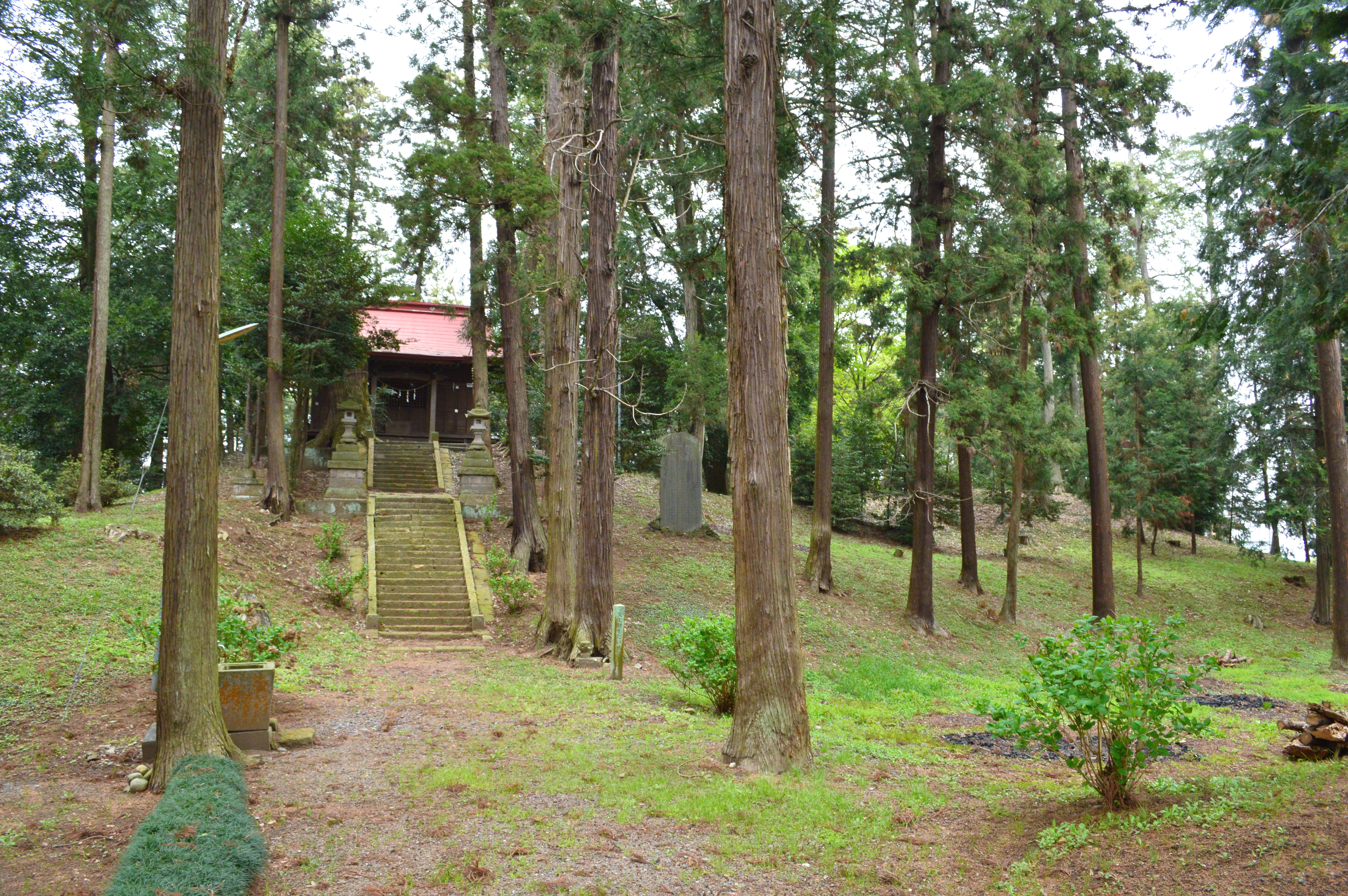 愛宕塚古墳 (壬生町) 遠景